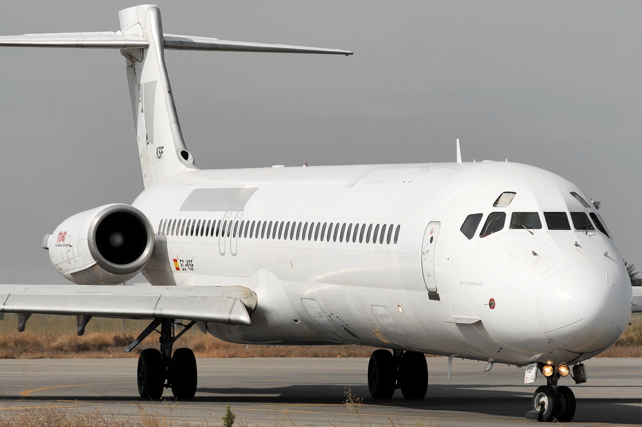 Aerofan McDonnell Douglas MD-87 EC-KSF (cn 53207) [Airframe Info] Murcia - San Javier (MJV / LELC), Spain 03 July, 2009